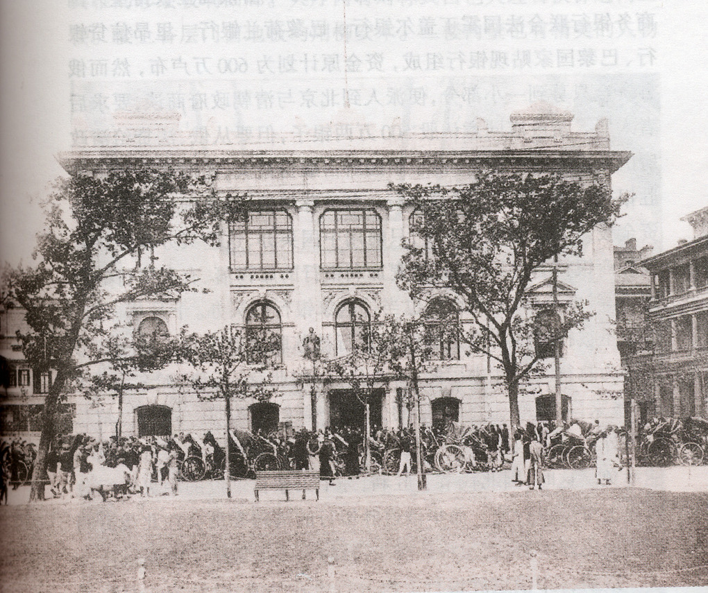 原上海华俄道胜银行大楼旧景